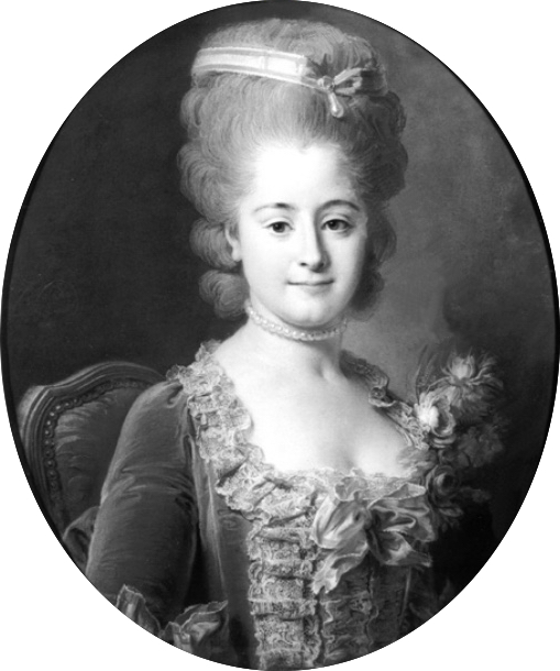 Mme Claude Baudard de Sainte-James, née Julie-Augustine Thibault-Dubois (1749–1813)